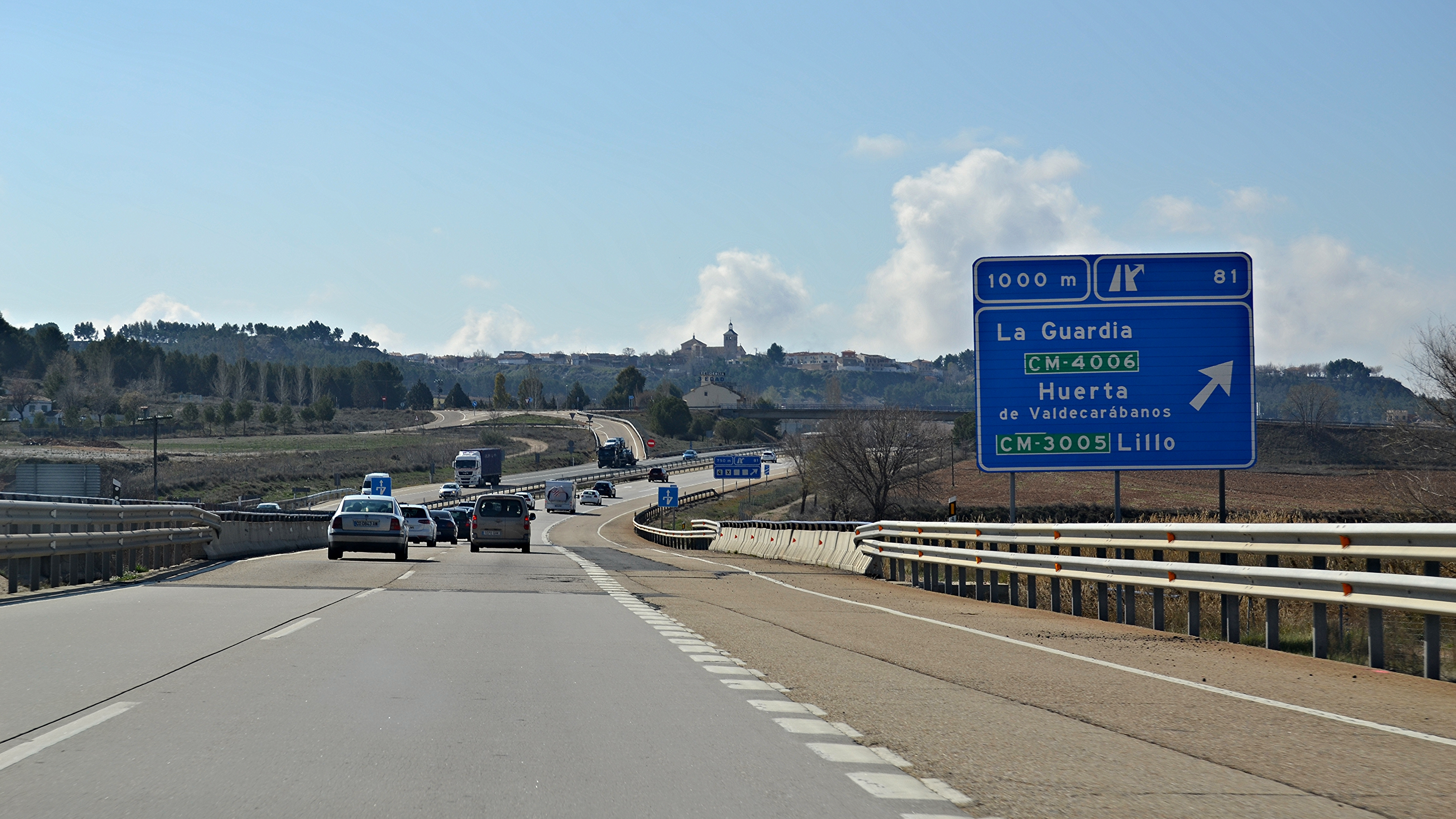 Viaje en coche Madrid-Córdoba-Cádiz, 2016.